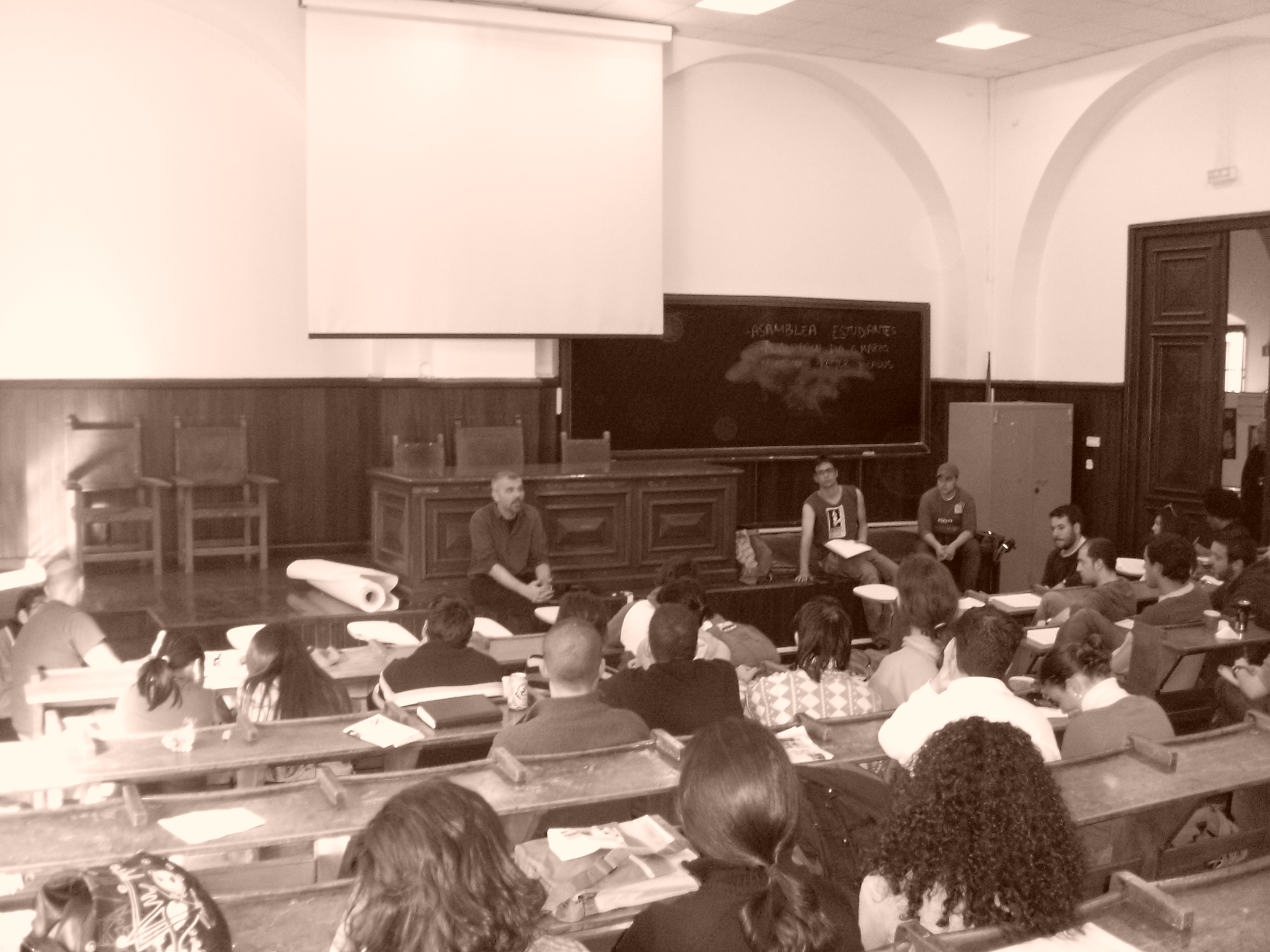 Fotografía de una de las charlas contra el Proceso de Bolonia celebrada en la Universidad de Sevilla en marzo de 2008. En ella apreciamos la ponencia de un profesor de dicha Universidad hacia los alumnos que asisten convocados por la Asamblea de Alumnos de la Facultad de Geografía e Historia en el Aula Magna.